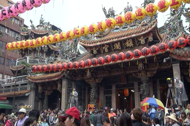 大甲鎮瀾宮。